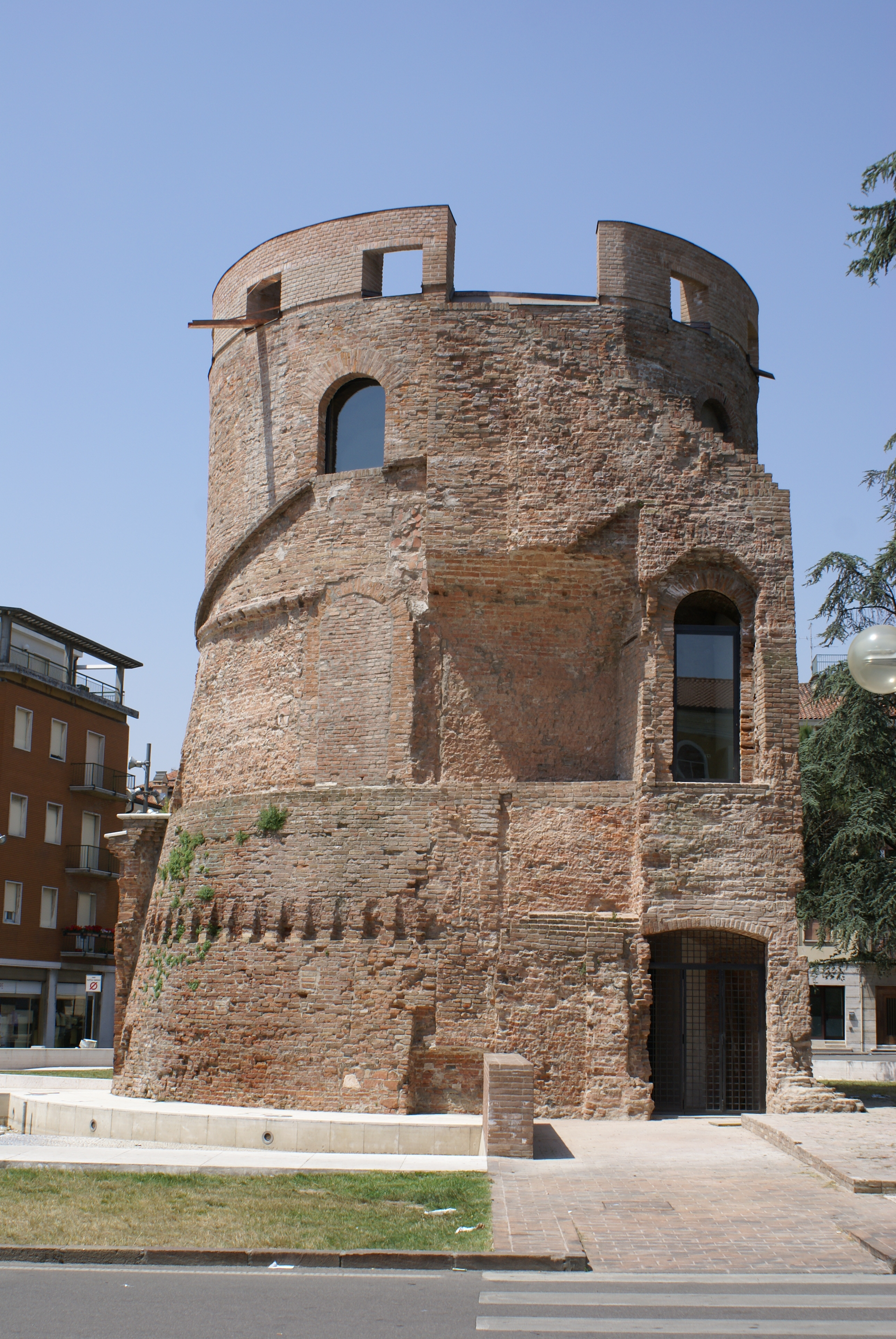 Torrione (appena finito da ristrutturare ma non fedelmente)